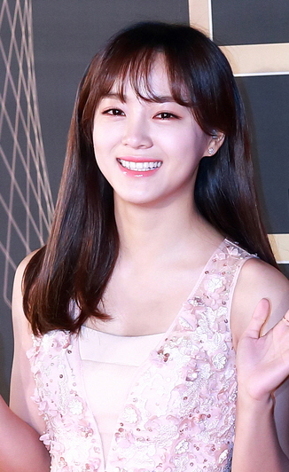 171231 구구단 세정 KBS 연기대상 레드카펫